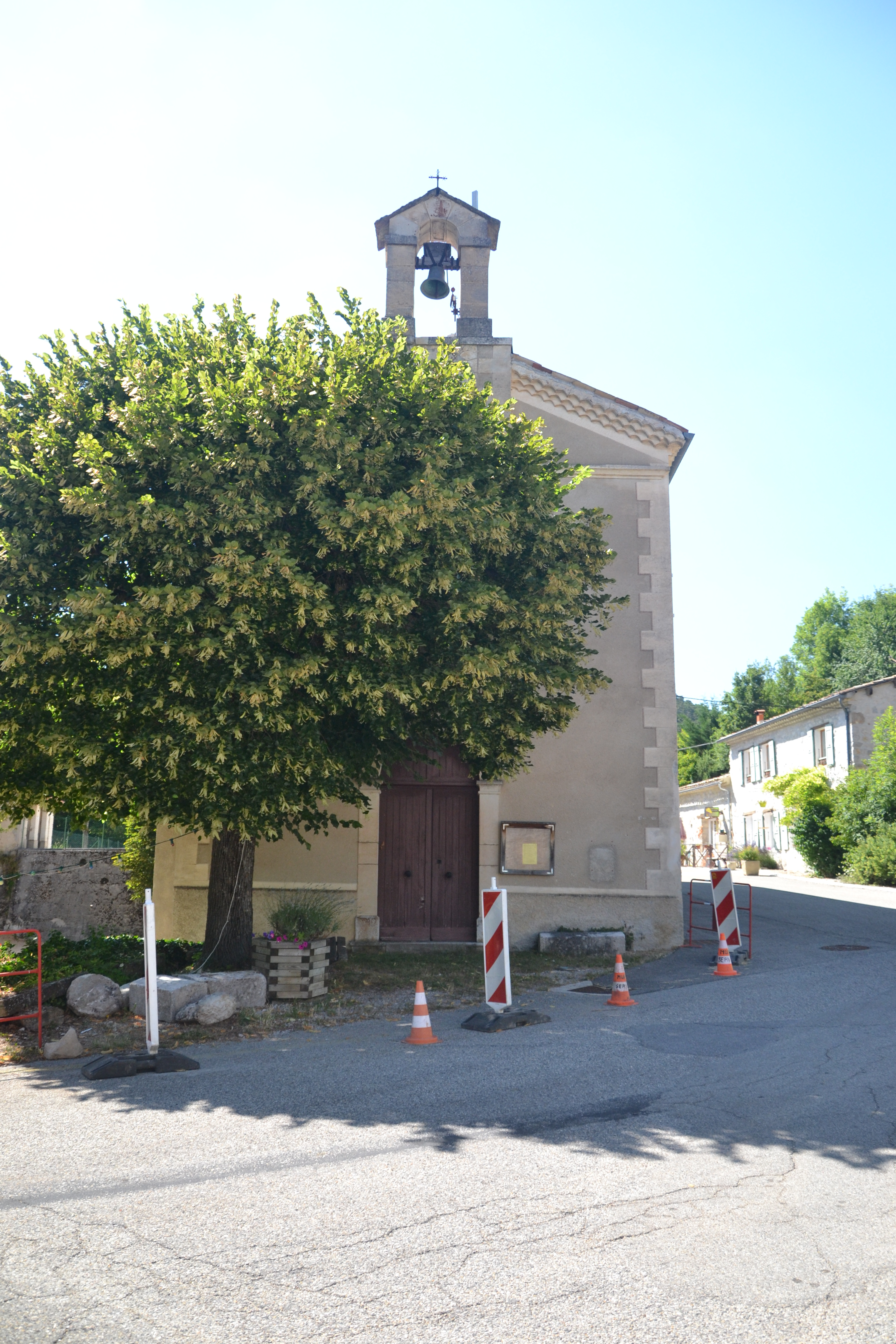 église de Bellegarde en Diois et tilleul